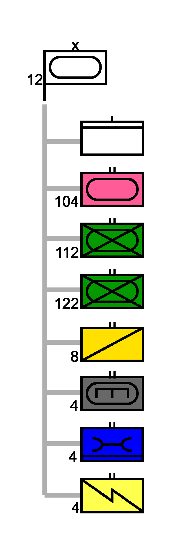 Gliederung Panzerbrigade 12 im deutschen Heeres.